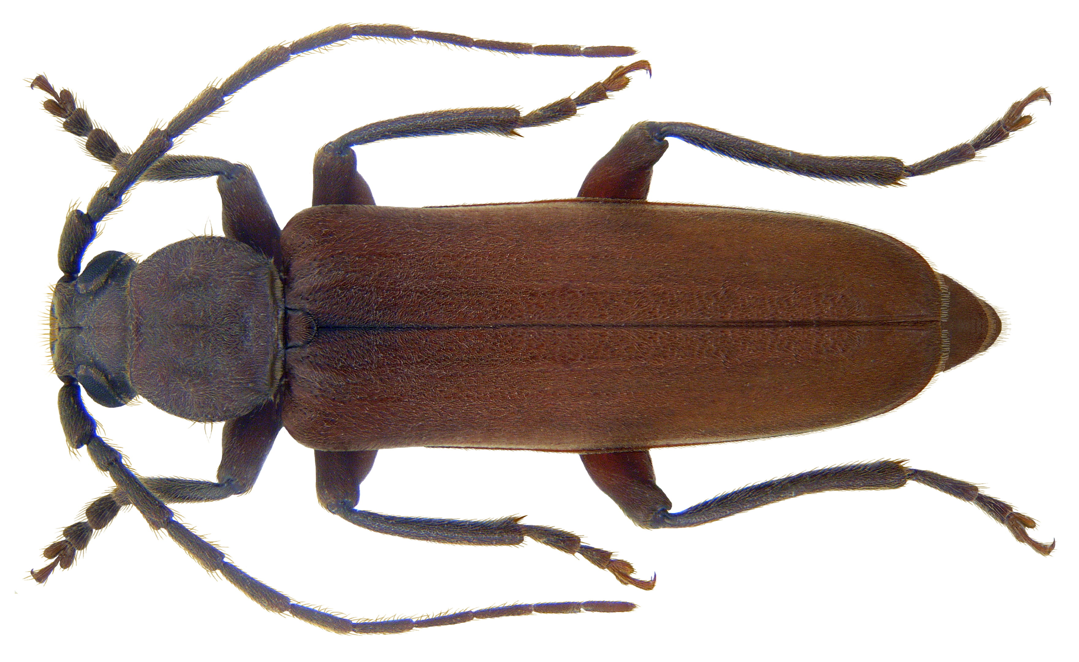 Familie: Cerambycidae Groesse: 10-30 mm Verbreitung: Europa Ökologie: Entwicklung in Nadelhölzern Fundort: Germania, Bayern, Oberfranken, Selbitz leg.det. U.Schmidt, 1998 Photo: U.Schmidt, 2009